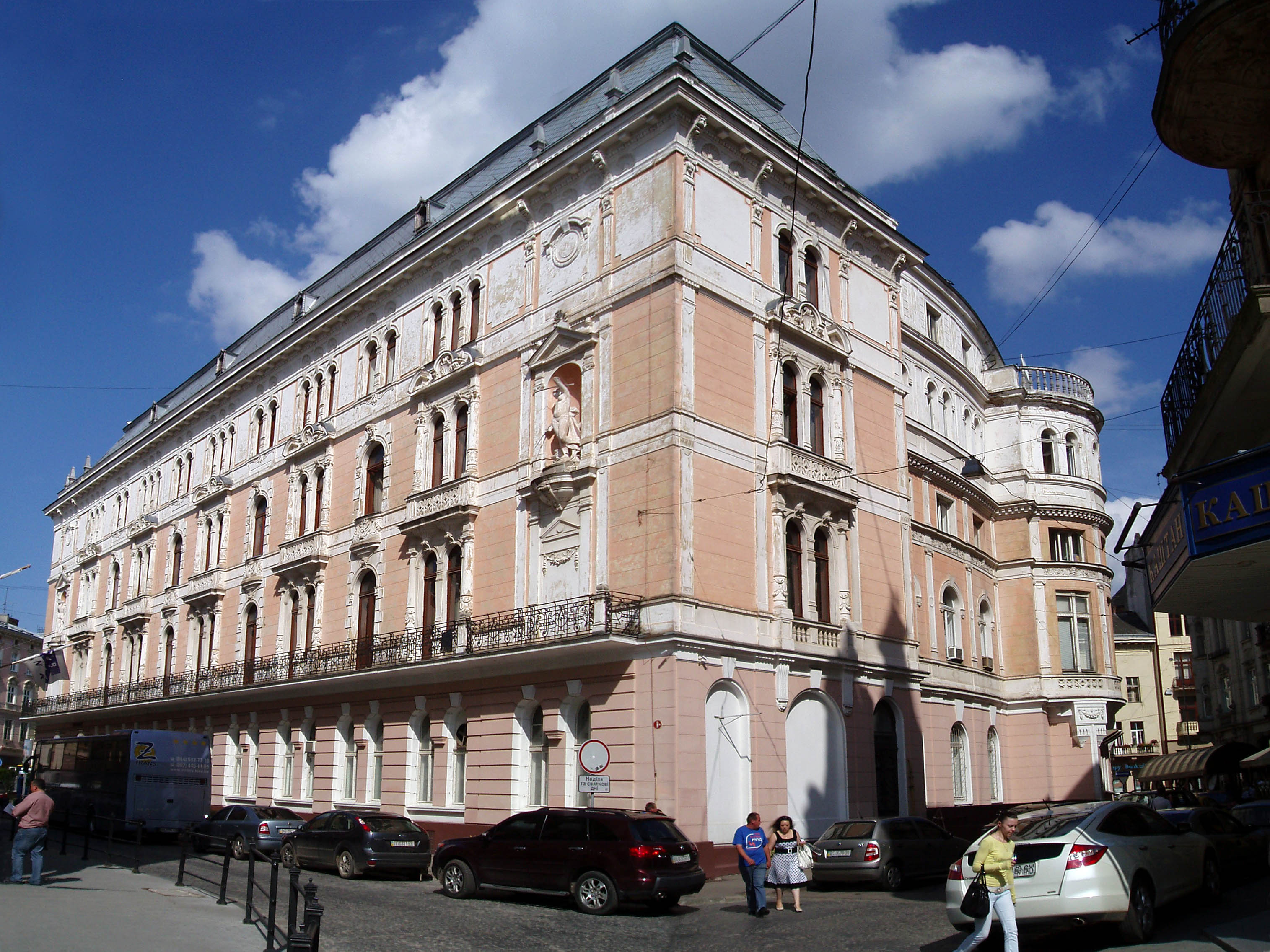 Готель «Жорж» у Львові. Збудований 1899 року за проектом бюро Фельнера і Гельмера, за участі Івана Левинського і Юліана Цибульського.